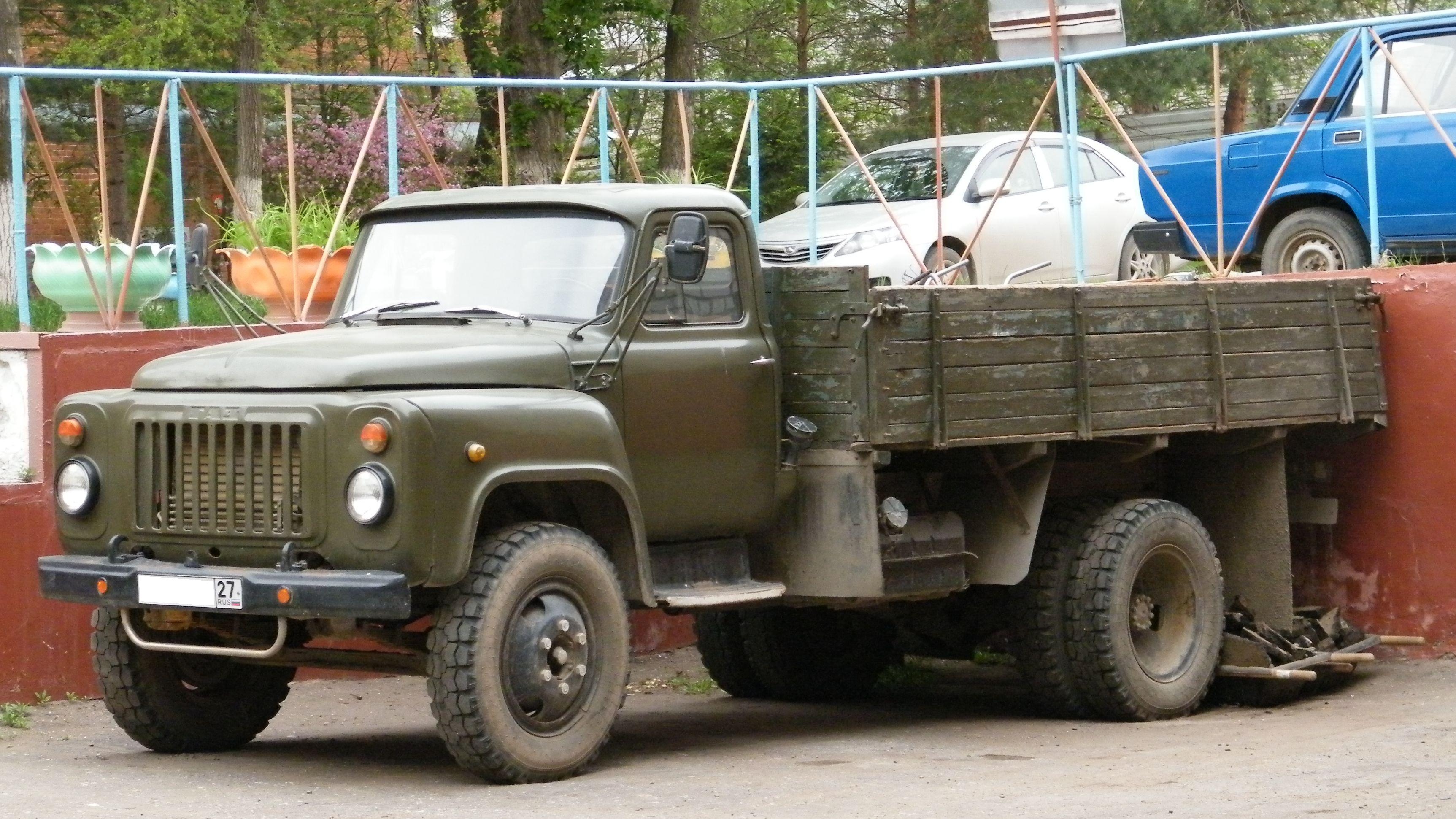 ГАЗ-53